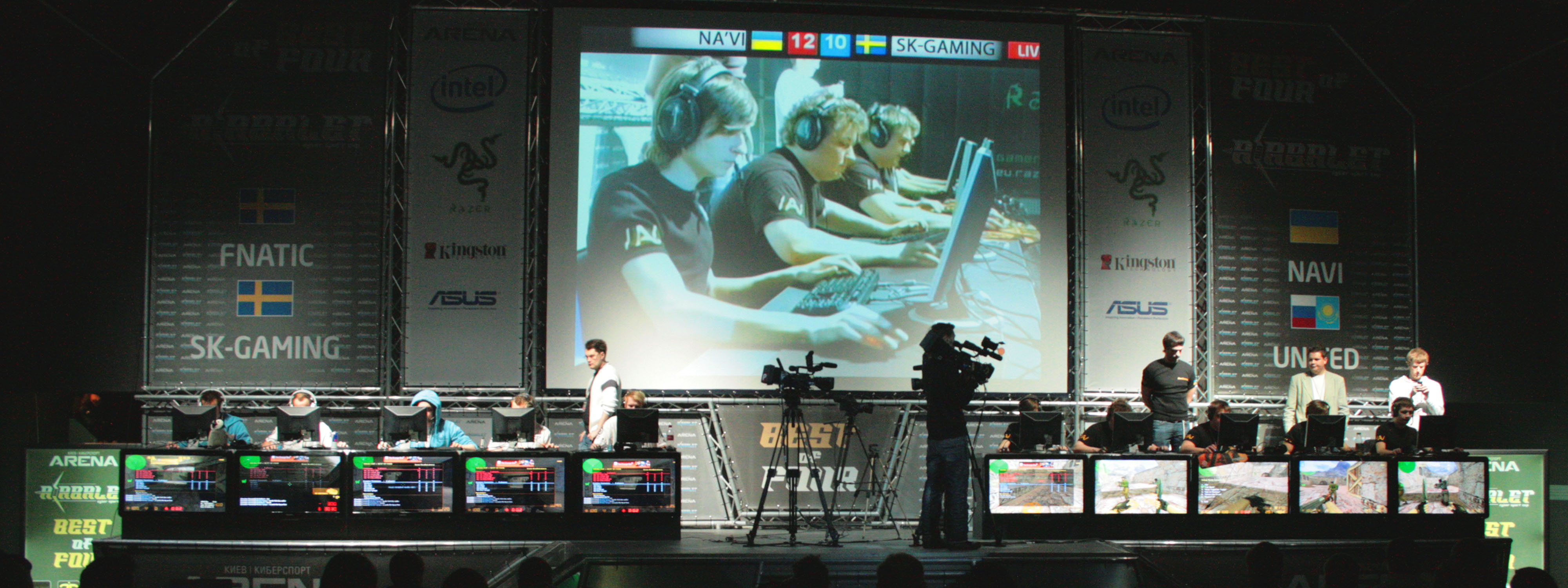 Фото сделано мною во время игры NA'VI и SK-GAMING